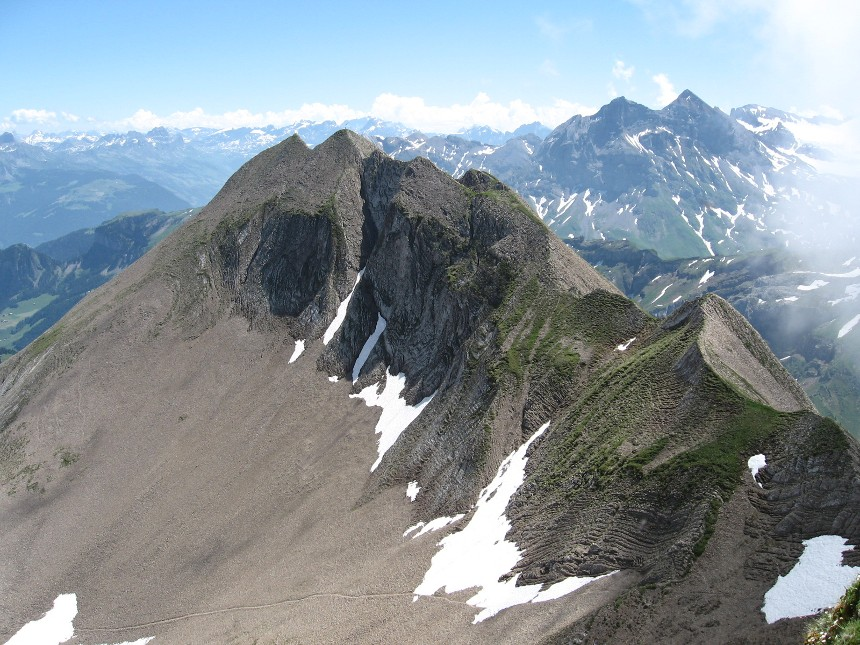 Hoh Brisen vom Brisen in Richtung Ost-Südost, rechts Uri Rotstock